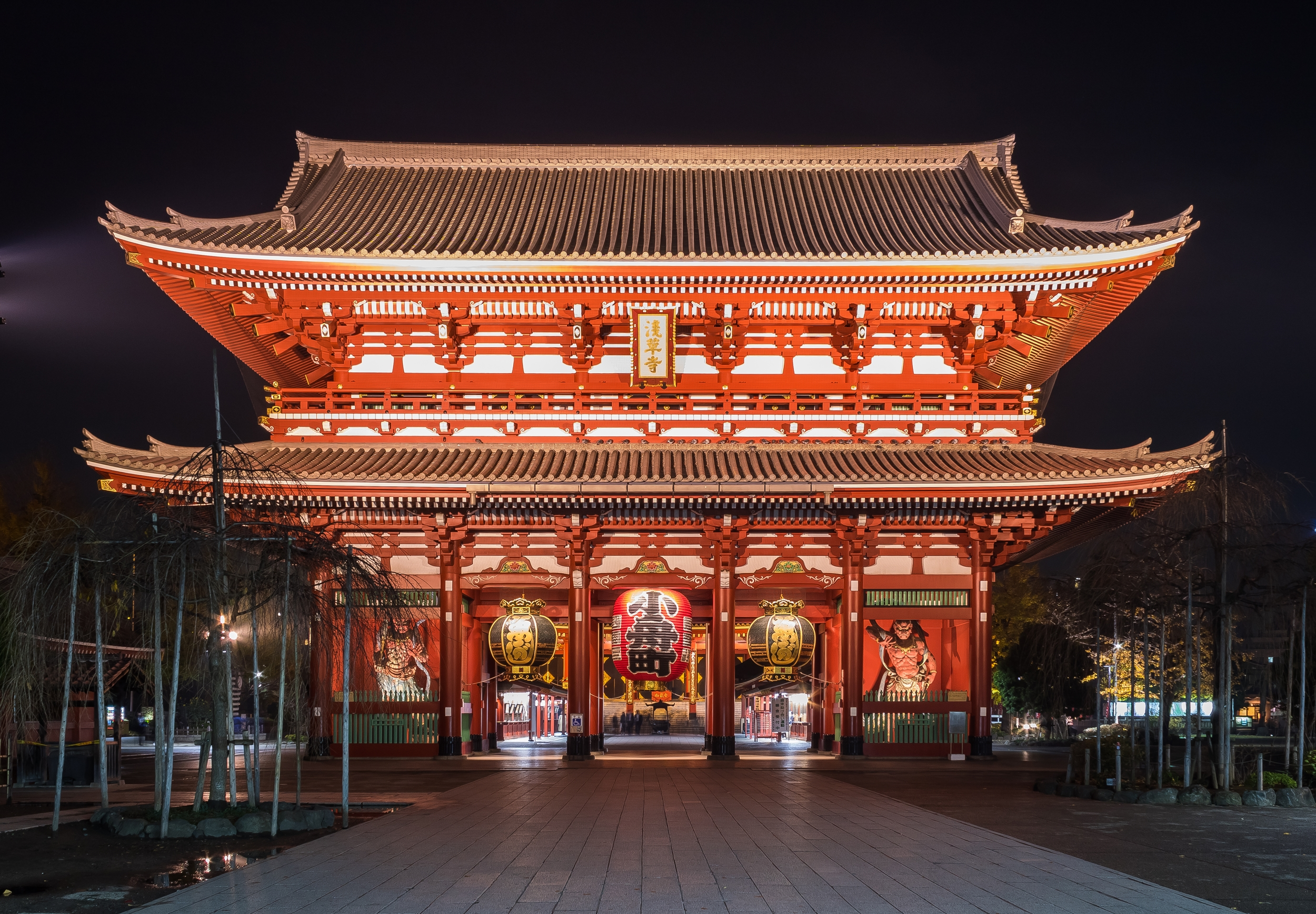 浅草寺宝蔵門のライトアップ